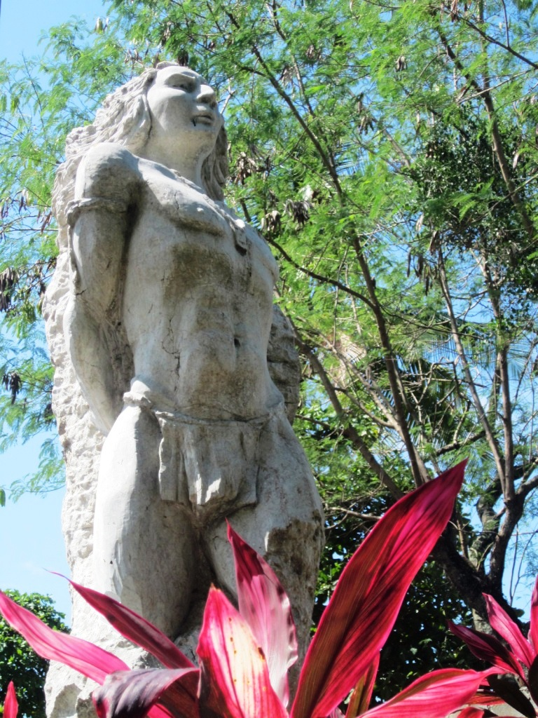 El Cacique Quepoa da el nombre al pueblo de Quepos